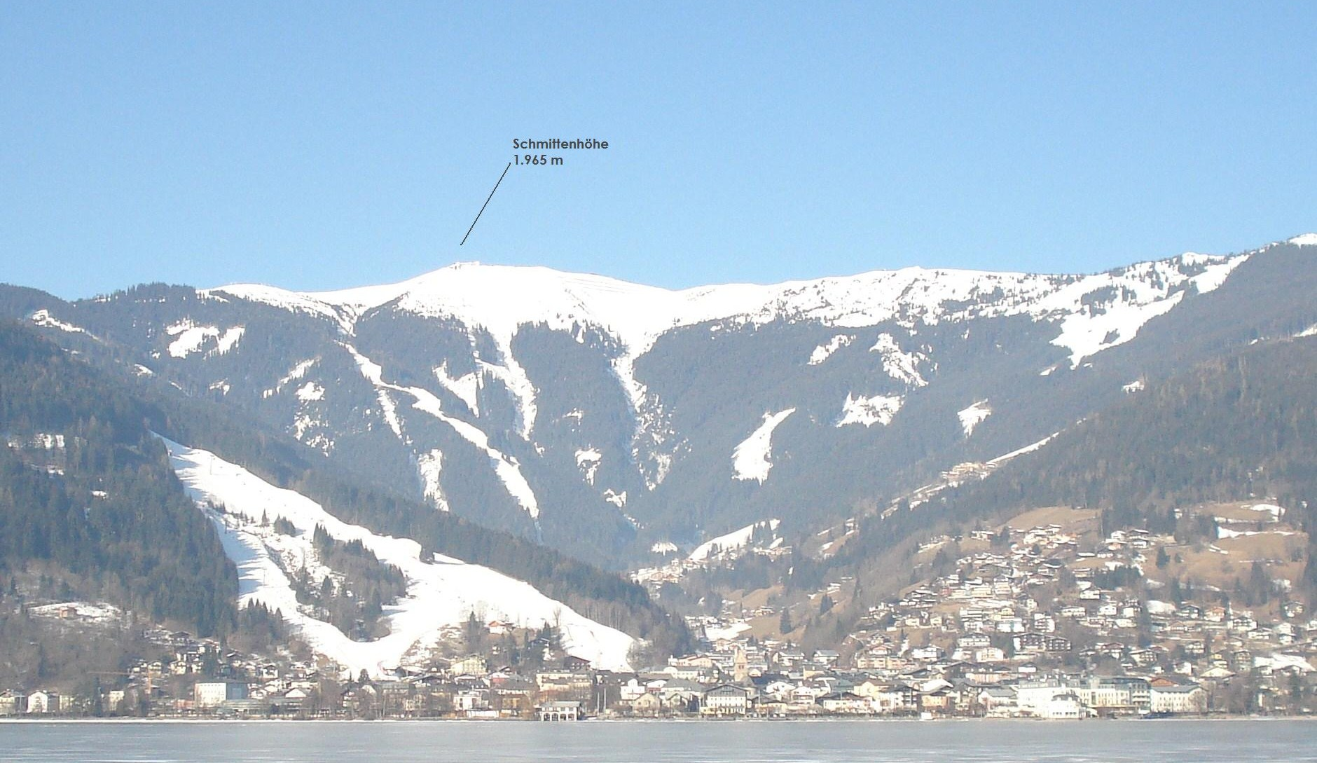 Schmittenhöhe